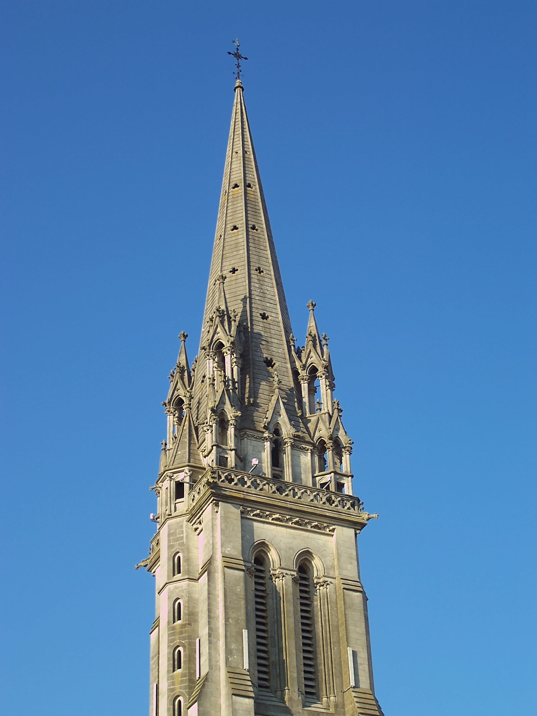 Eglise St Jean-Baptiste